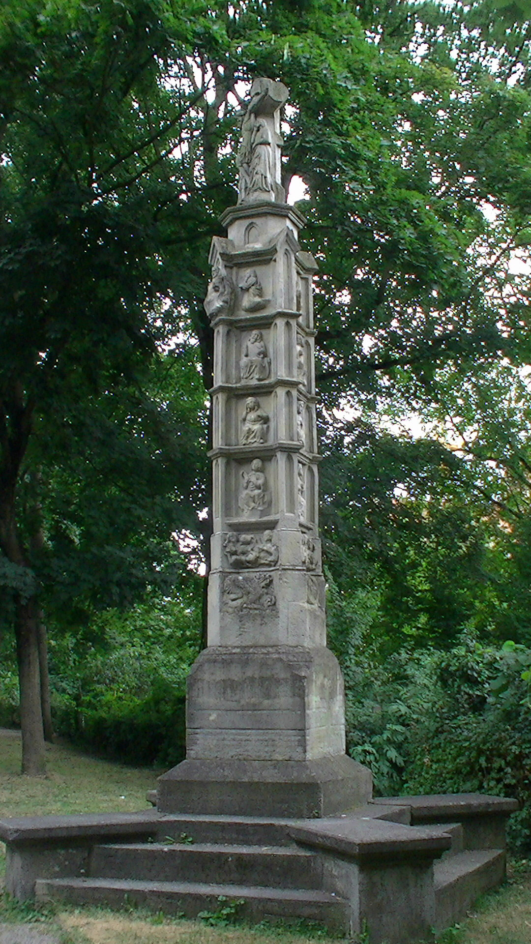 Die Predigtsäule in Regensburg von Osten gesehen.